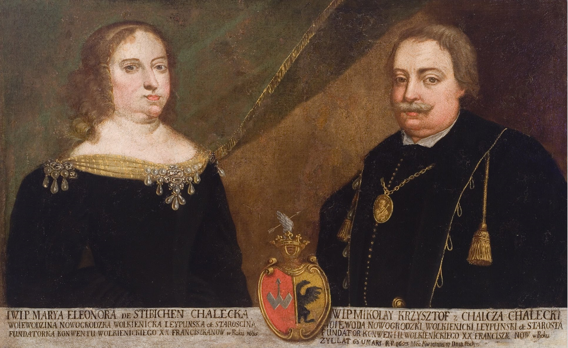 Беларуская (тарашкевіца): Партрэт Мікалая Крыштапа Халецкага (Mikałaj Kryštap Chalecki) і яго жонкі Марыі Элеаноры (Maryja Eleanora Chaleckaja) з Стыбіхенаў (Stibichen)